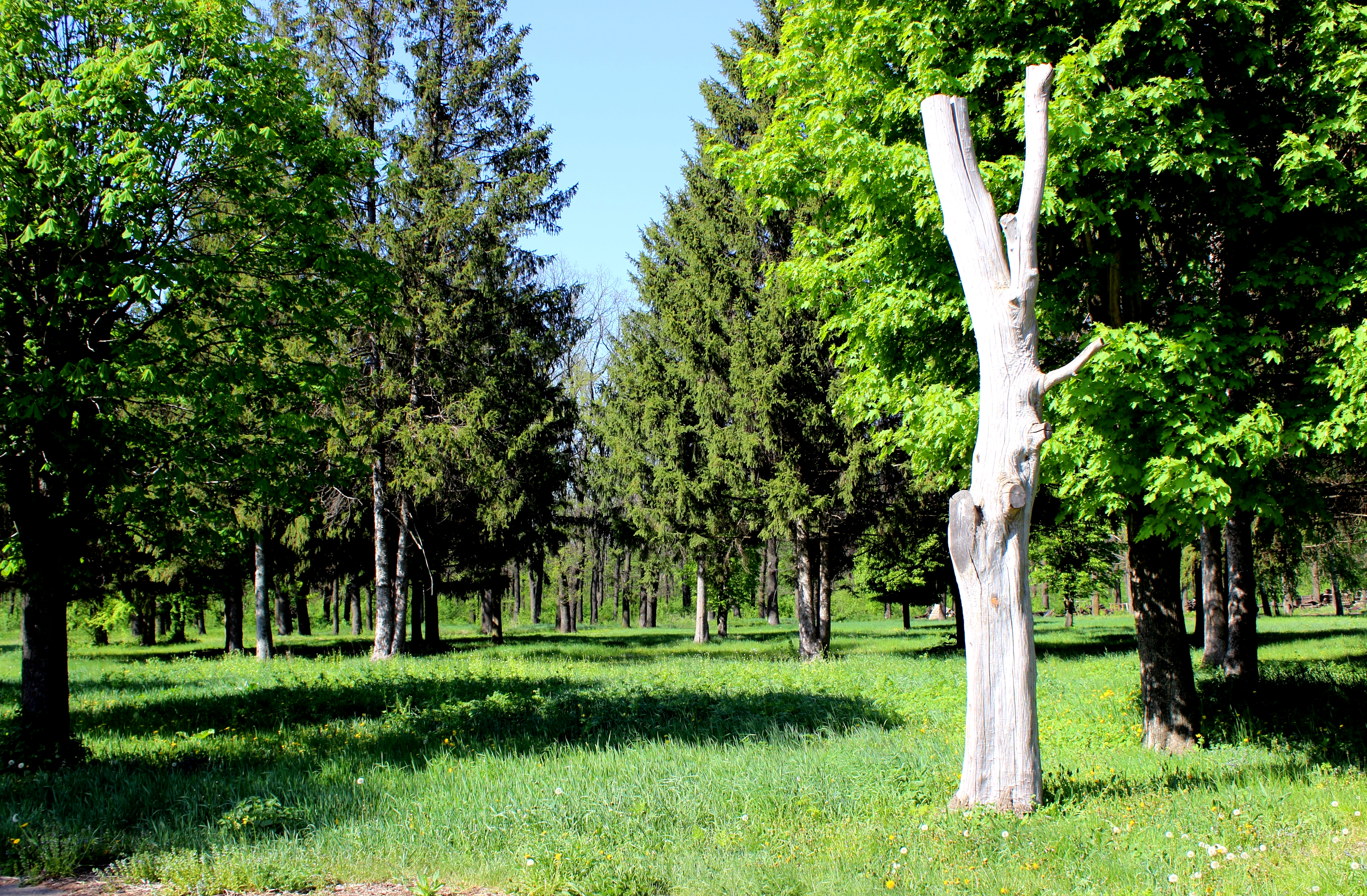 Форест-парк